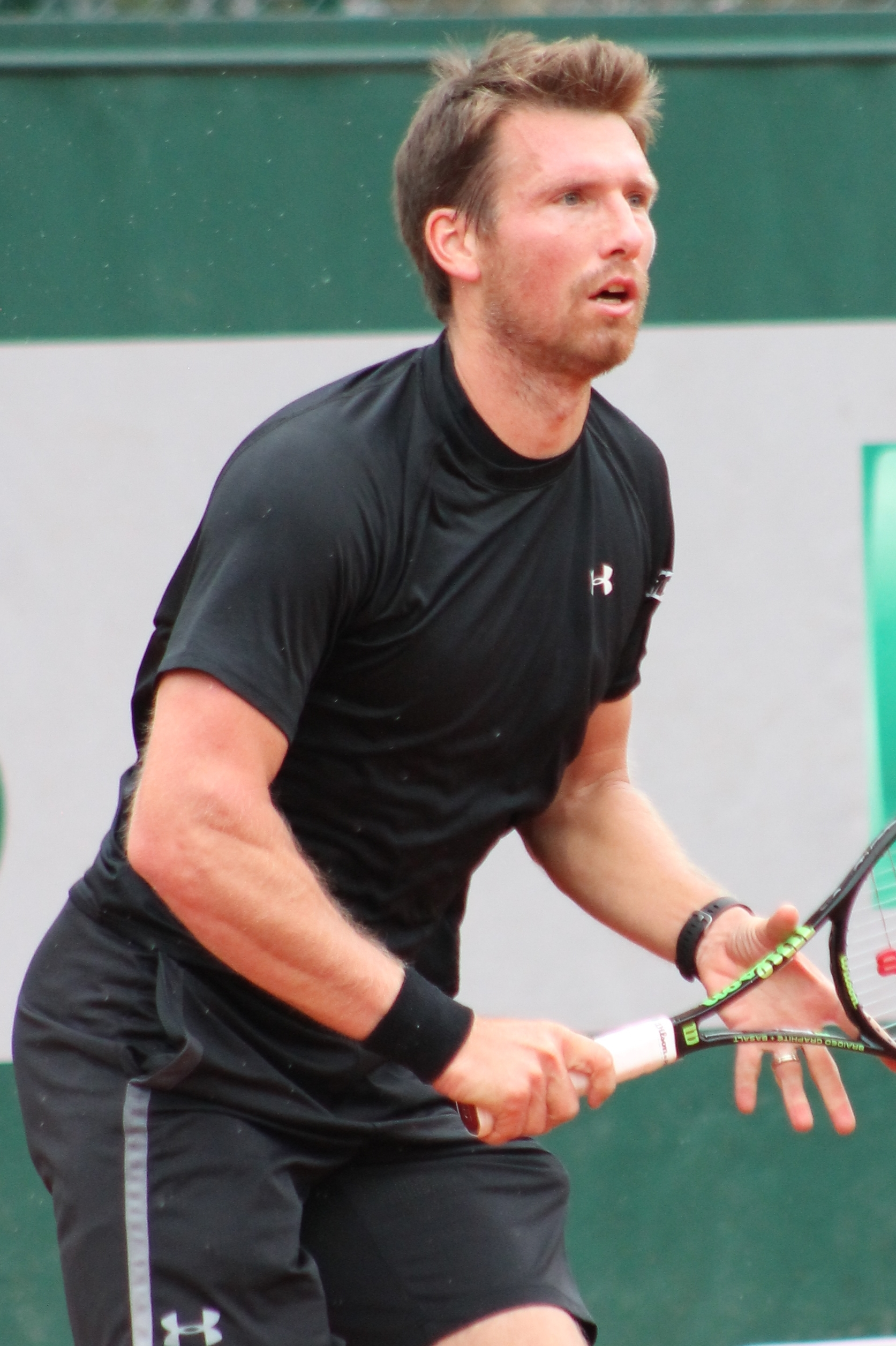 Peya RG16 (3)